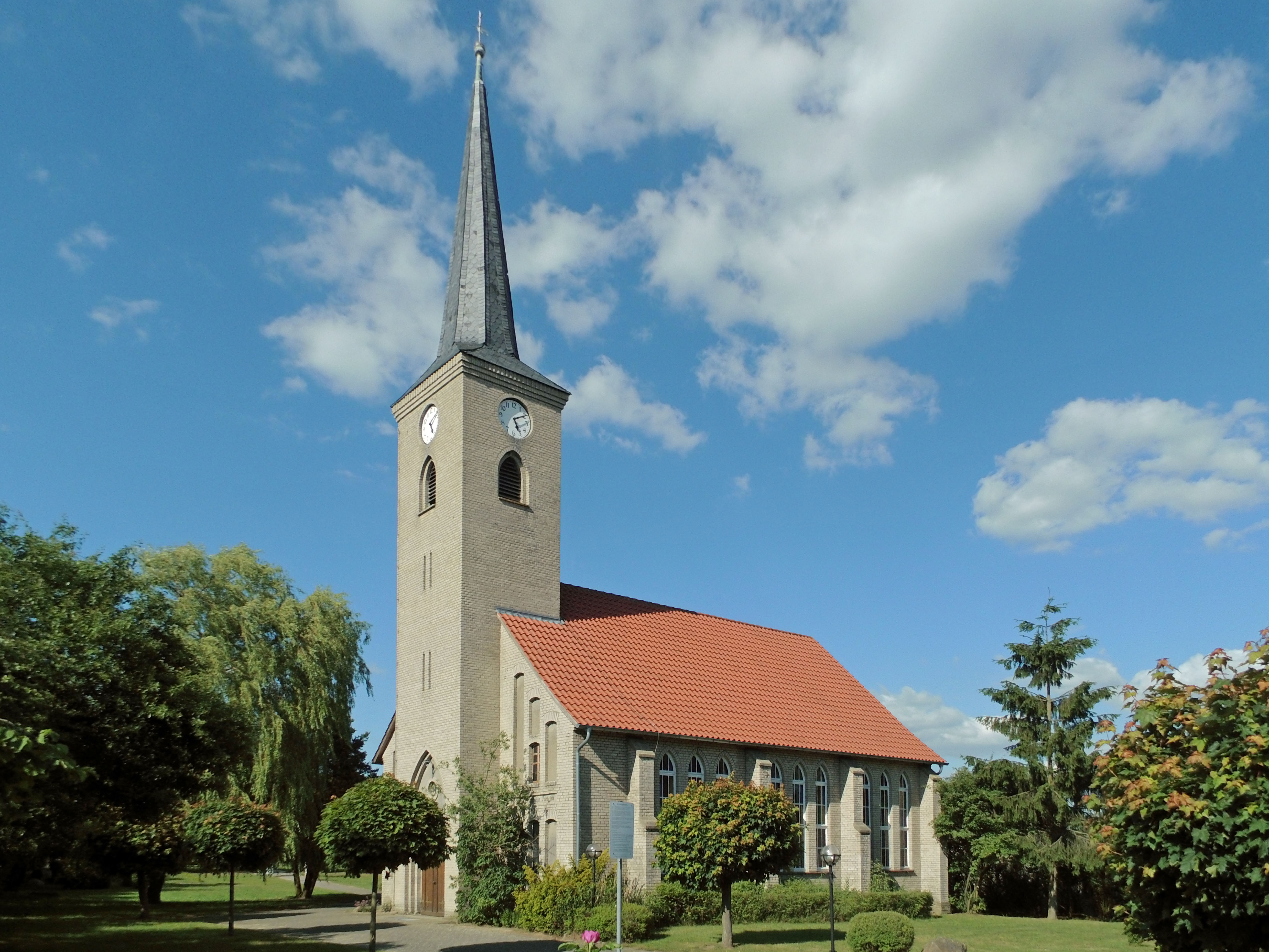 Kirche in Lüdelsen (Sachsen-Anhalt)